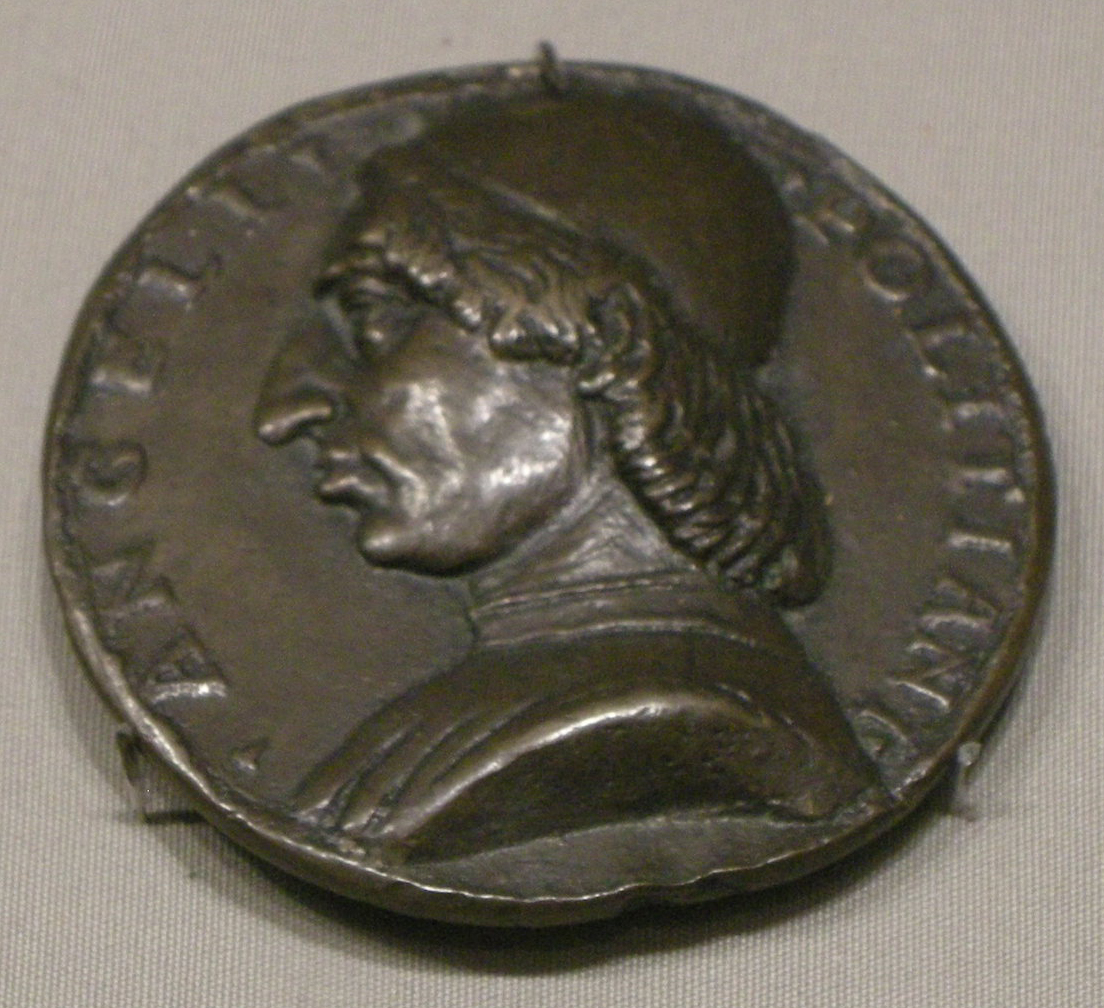 Medaglia di Agnolo Poliziano, 1490 ca.